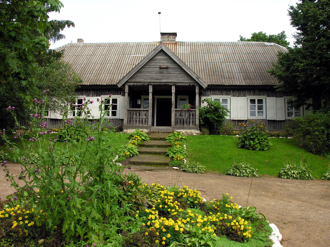 Žemaitėška: bat-smg:Bukante (lt. Bukantė) Rašytuojės Žemaitės gimtėnė (muziejos) Bukantie bat-smg:Žemaitėjės naciuonalėnis parks Puortegrapėje Algirda, 2007-08-23, bat-smg:Žemaitėjė